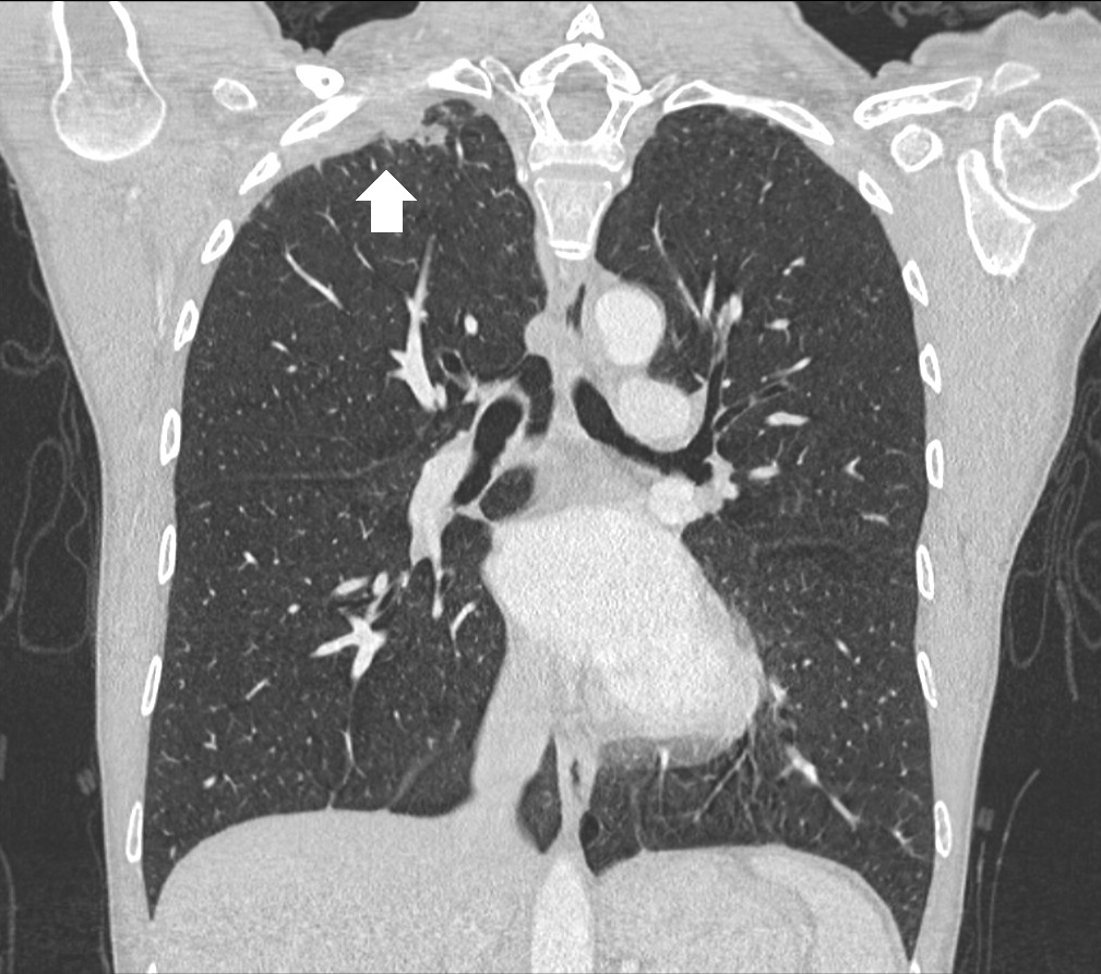 Coupe TDM en fenêtre parenchymateuse montrant une tumeur infiltrant l'apex pulmonaire droit.